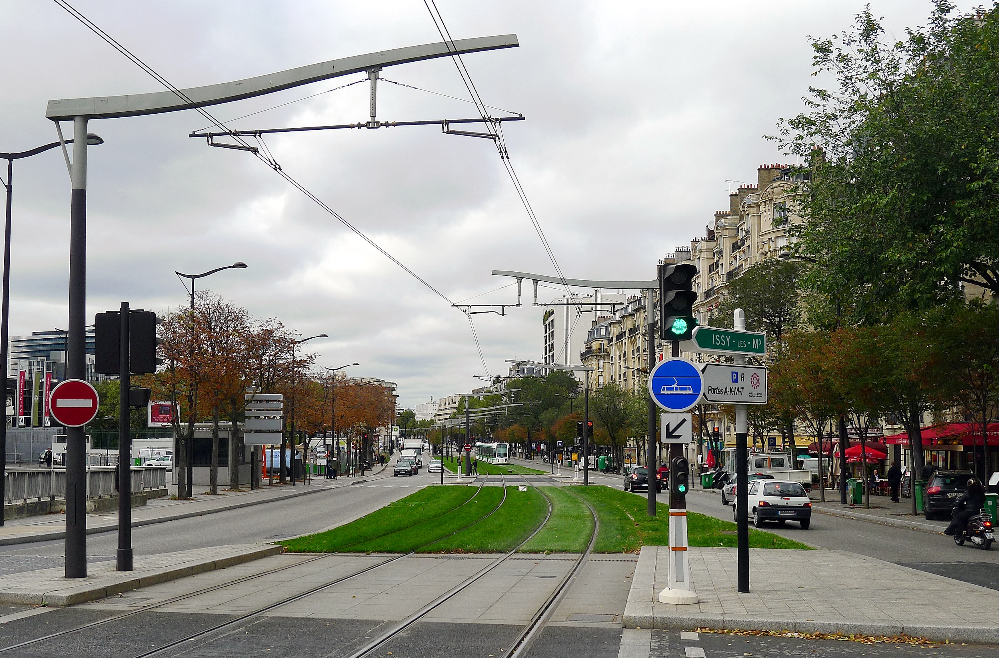 Boulevard Victor et ligne T3 à la porte de Versailles - Paris XV